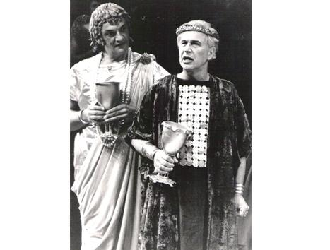 שלומית, הבימה, 1982, עיצוב תלבושות